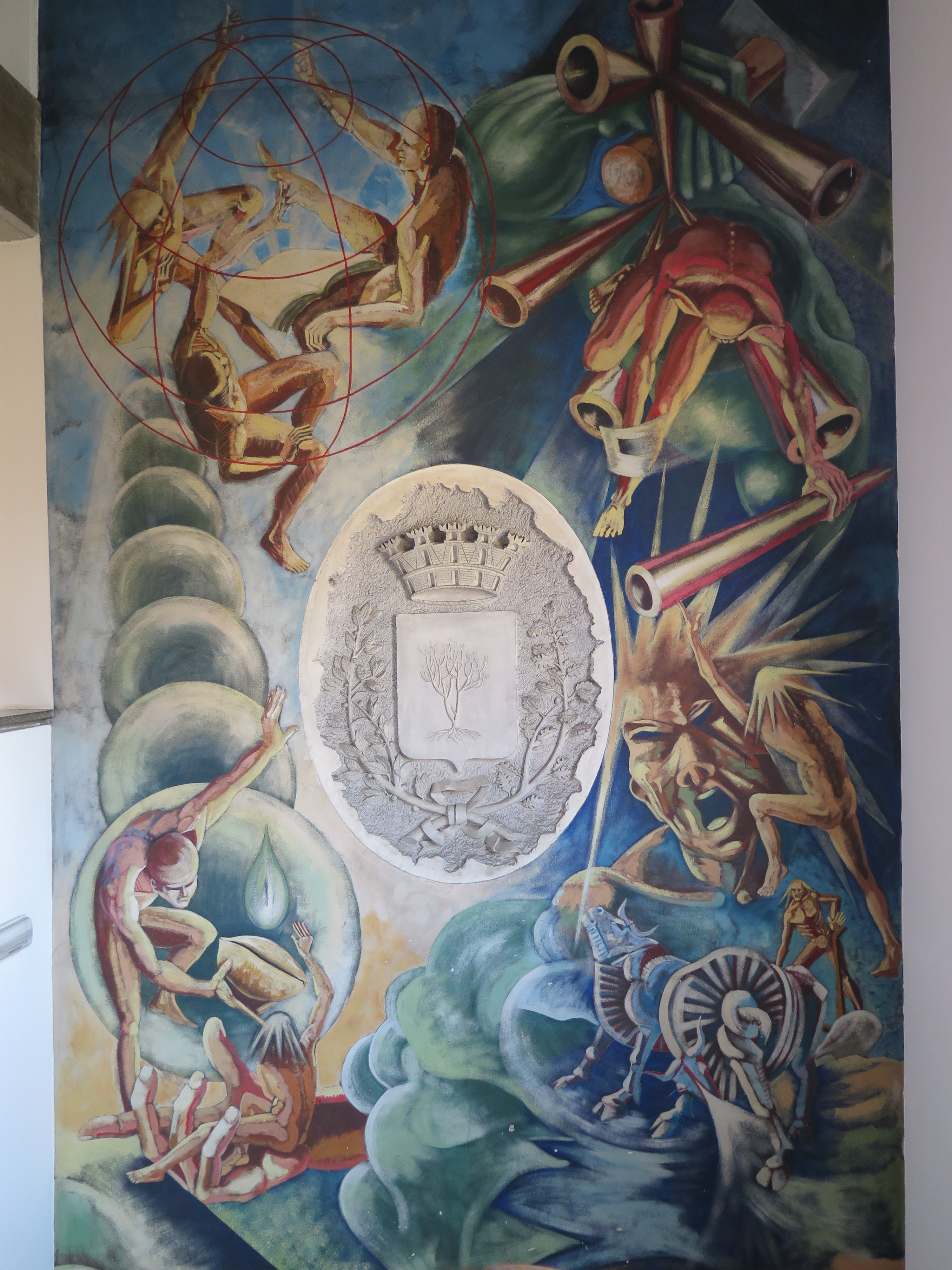 "Arti e mestieri" - affresco di Max Squillace, Franco Ghezzi e Gian Mario Mariani all'interno di Villa Fiorita a Brugherio